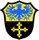 Das Gemeindewappen erinnert an zwei bedeutende Grundherren, die im Gemeindegebiet über den größten Besitz verfügten. Der blaue Adler in goldenem Feld ist in verwechselten Farben dem Wappen der Grafen von Andechs entnommen. Seit 1078 war die Burg Merching Mittelpunkt der Andechser Grafenherrschaft am Lechrain. Im 12. Jahrhundert schenkten die Grafen Güter in Merching an die Klöster Dießen und St. Ulrich in Augsburg. Beide Klöster konnten ihren Besitz im Ort lange Zeit halten. Das goldene Kleeblattkreuz in schwarzem Feld ist das Wappen der Reichsabtei St. Ulrich und Afra in Augsburg und erinnert an ihre Grundherrschaft im Gemeindegebiet.